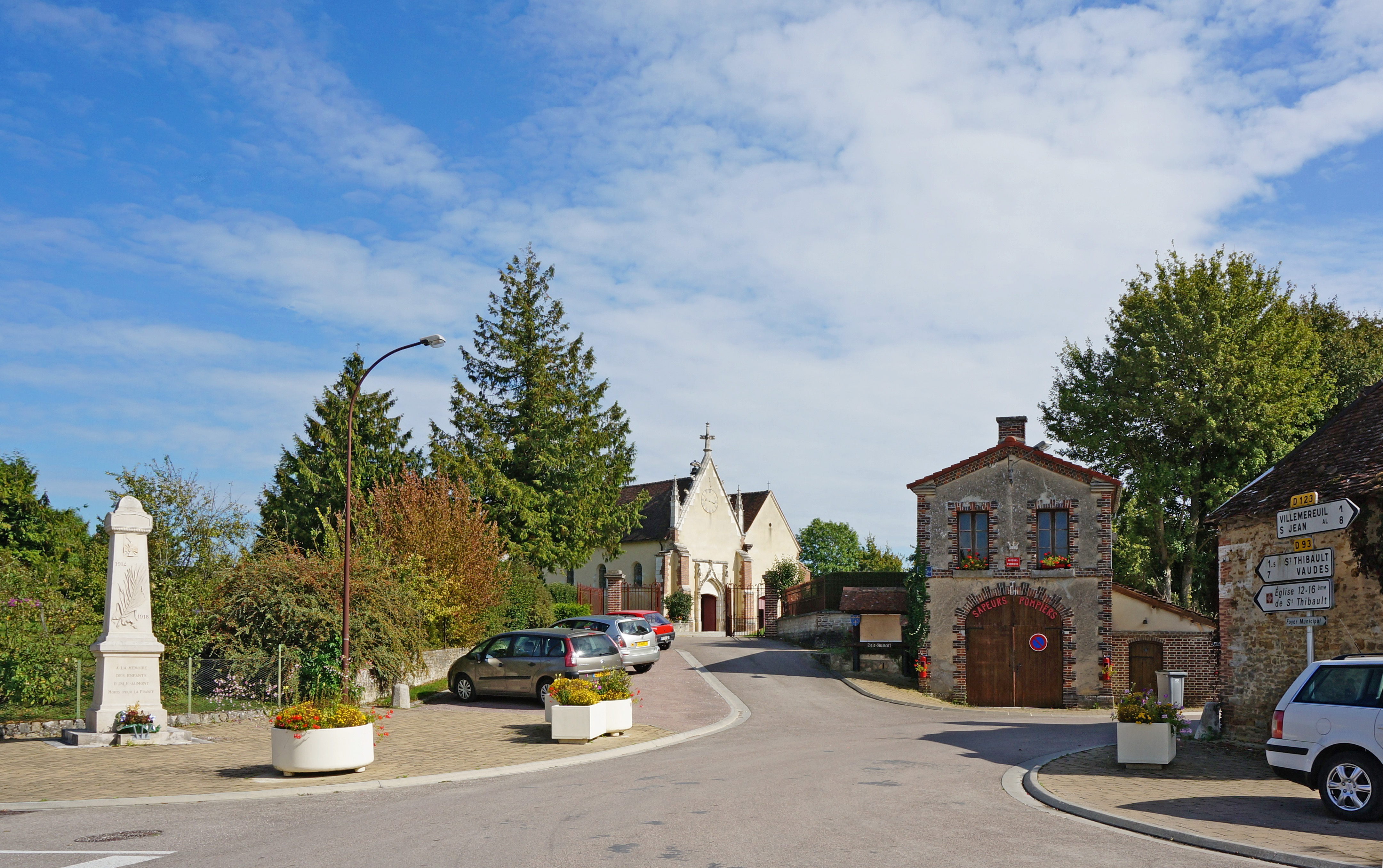 la Vierge à l'Enfant, Isle Aumont.